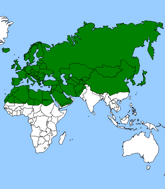 écozone palearctique